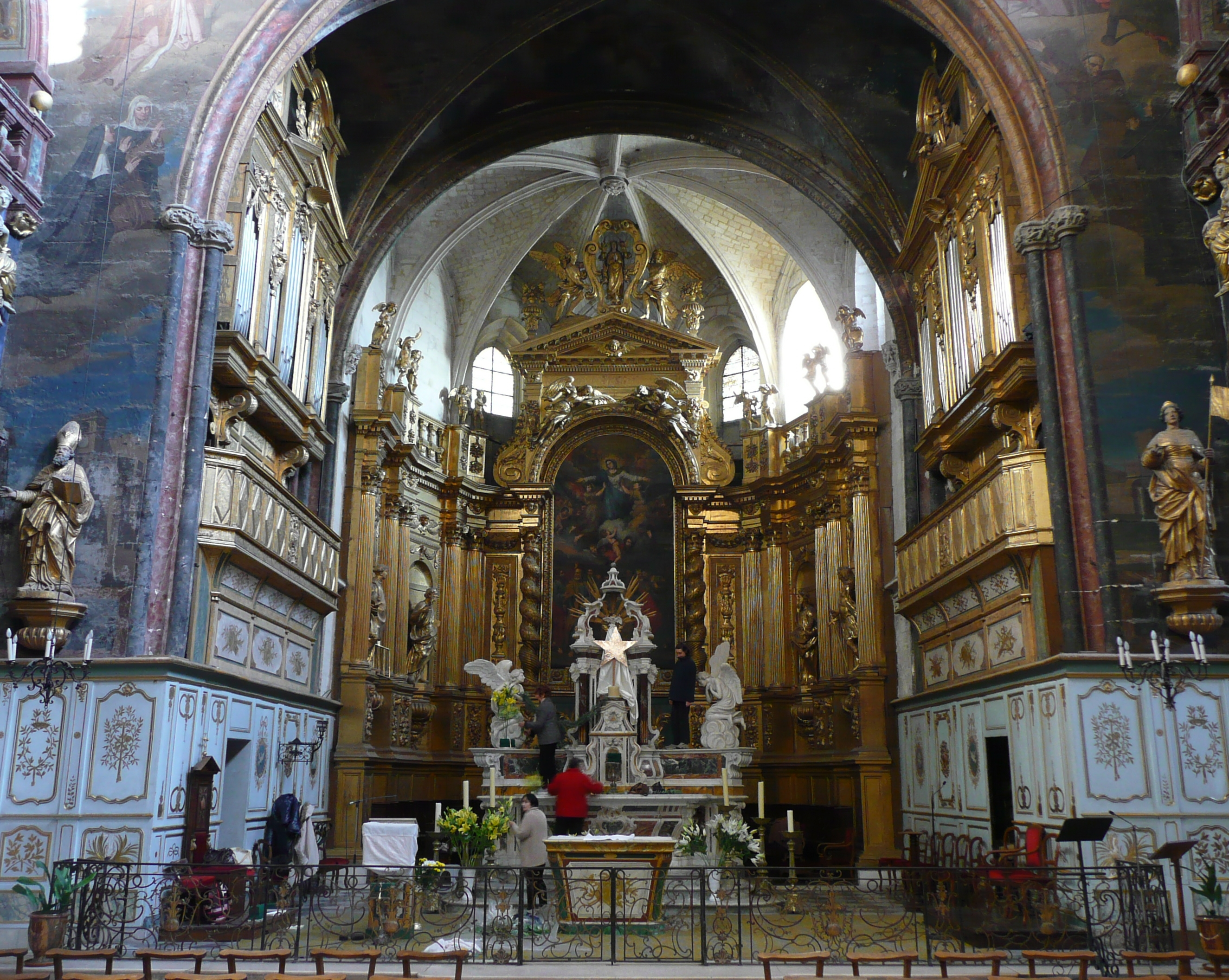 Chœur vu de loin